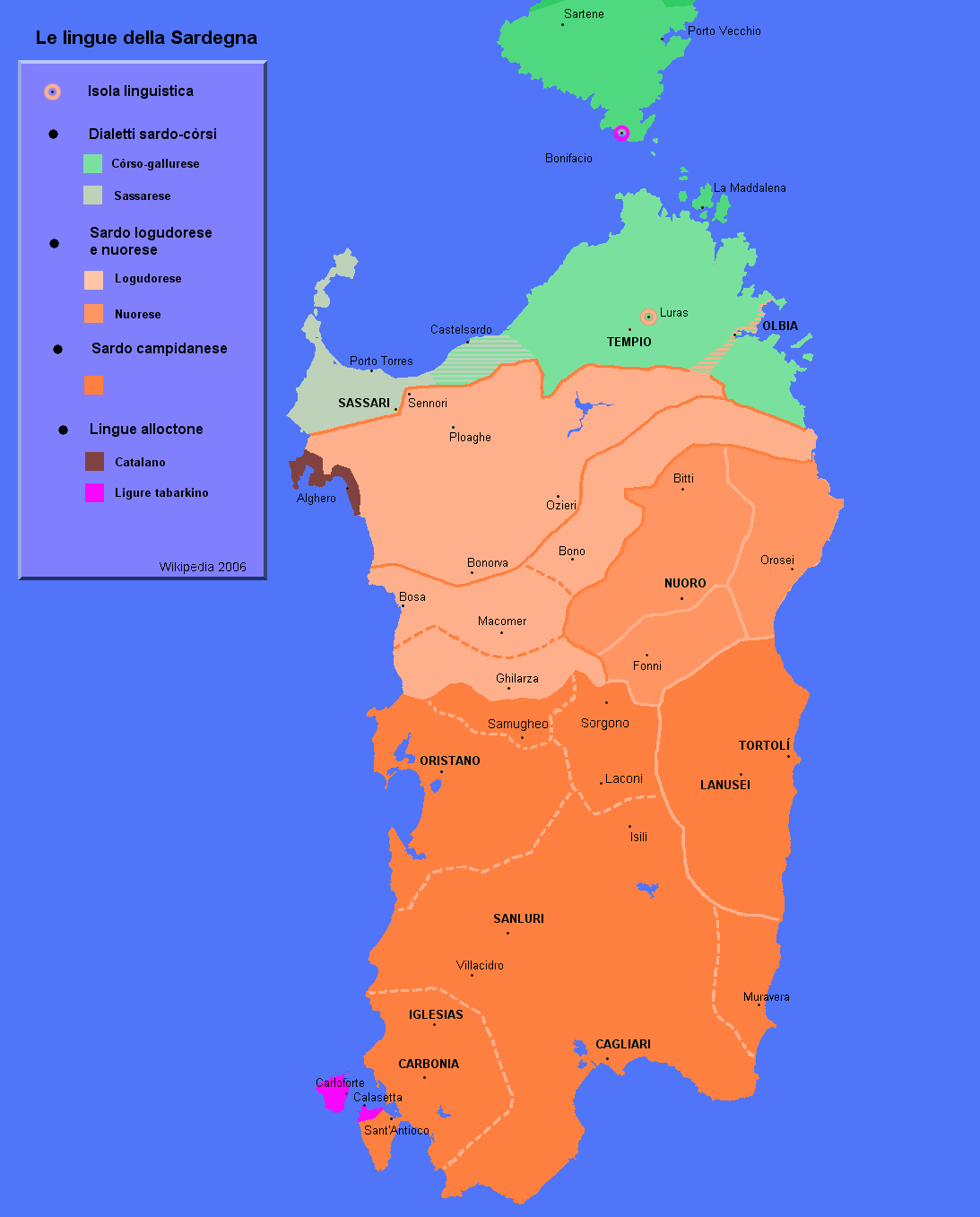 Classificazione delle lingue e dei dialetti della Sardegna / Classification of languages and dialects of Sardinia. Rielaborazione di una mappa di Jkens (GFDL).